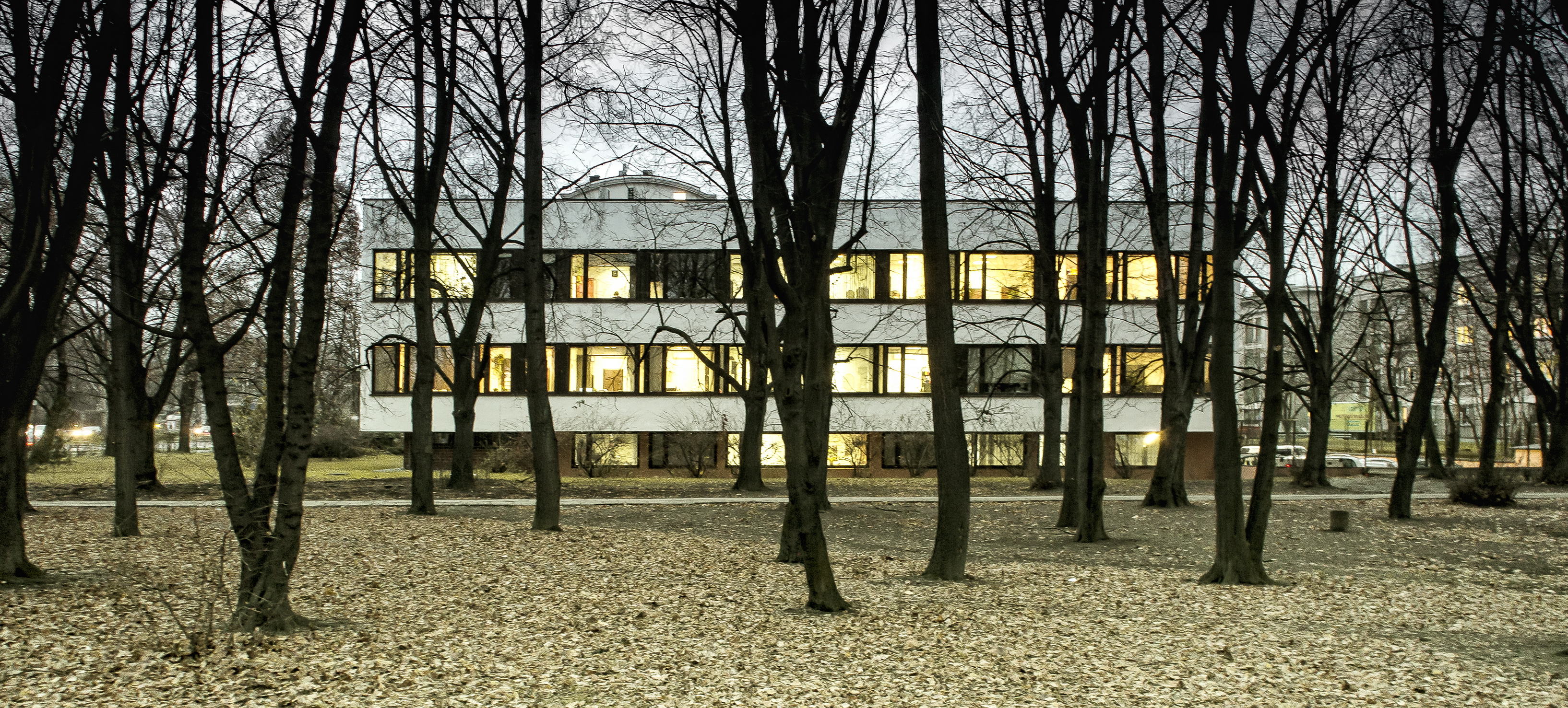 Siedziba KRUS w Warszawie przy al. Niepodległości 190, z 1974r., zaprojektowana przez Halinę Skibniewską